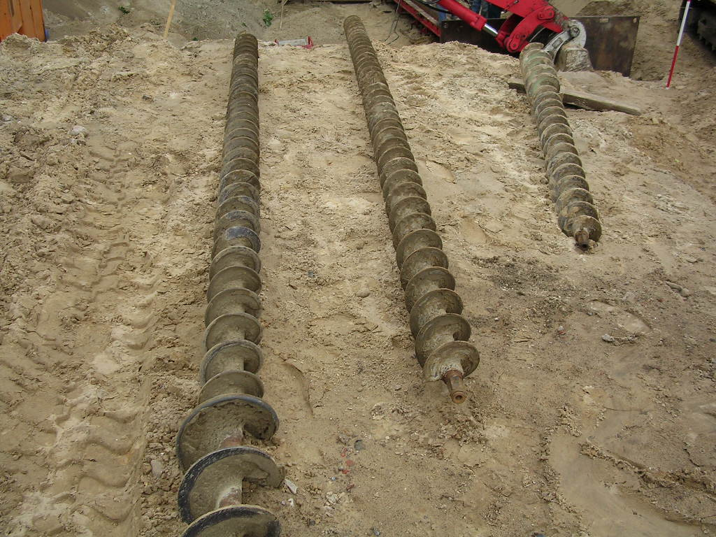 Bohrgestängefür eine Bohrpressung